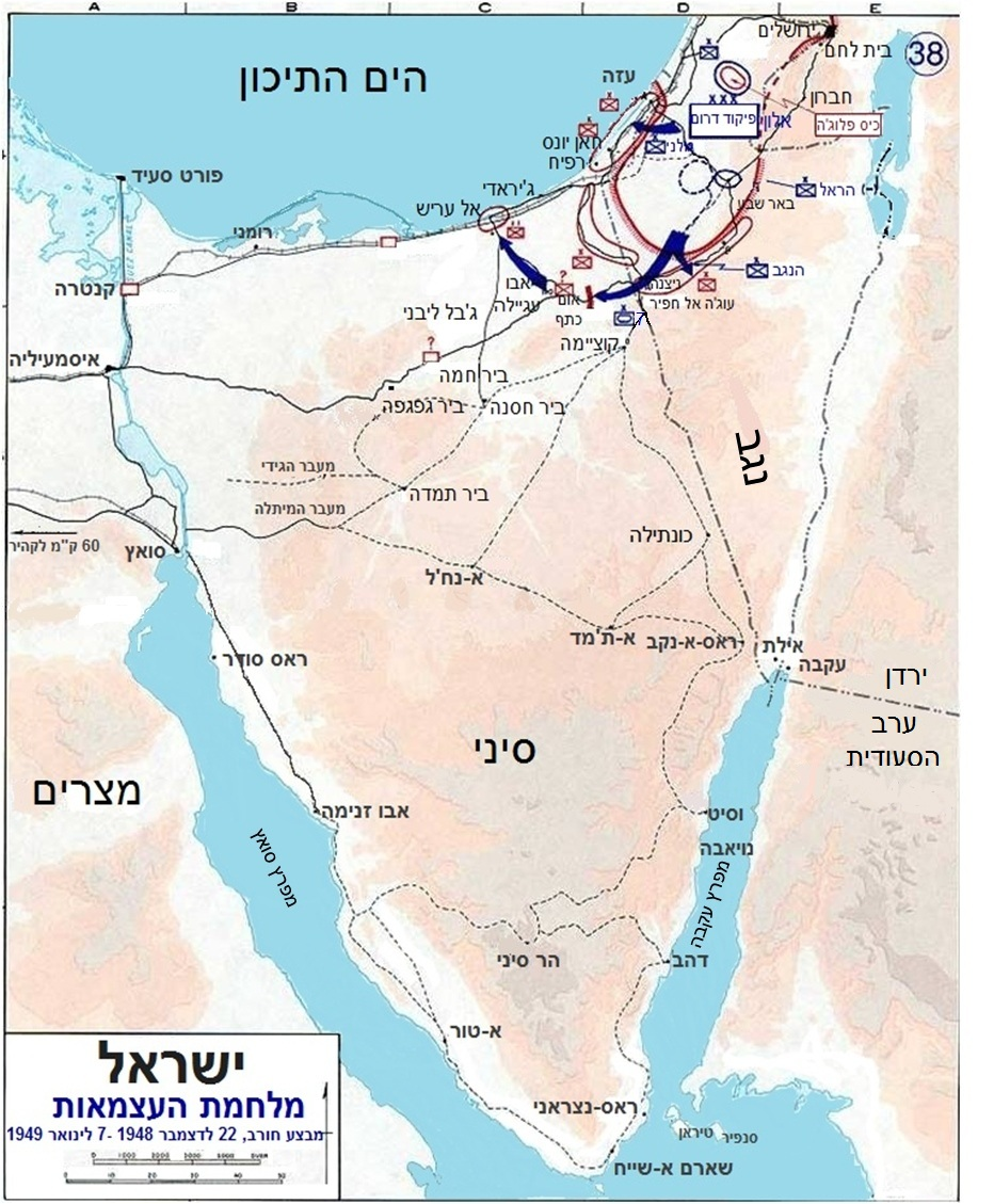 מפה של מבצע חורב במלחמת העצמאות